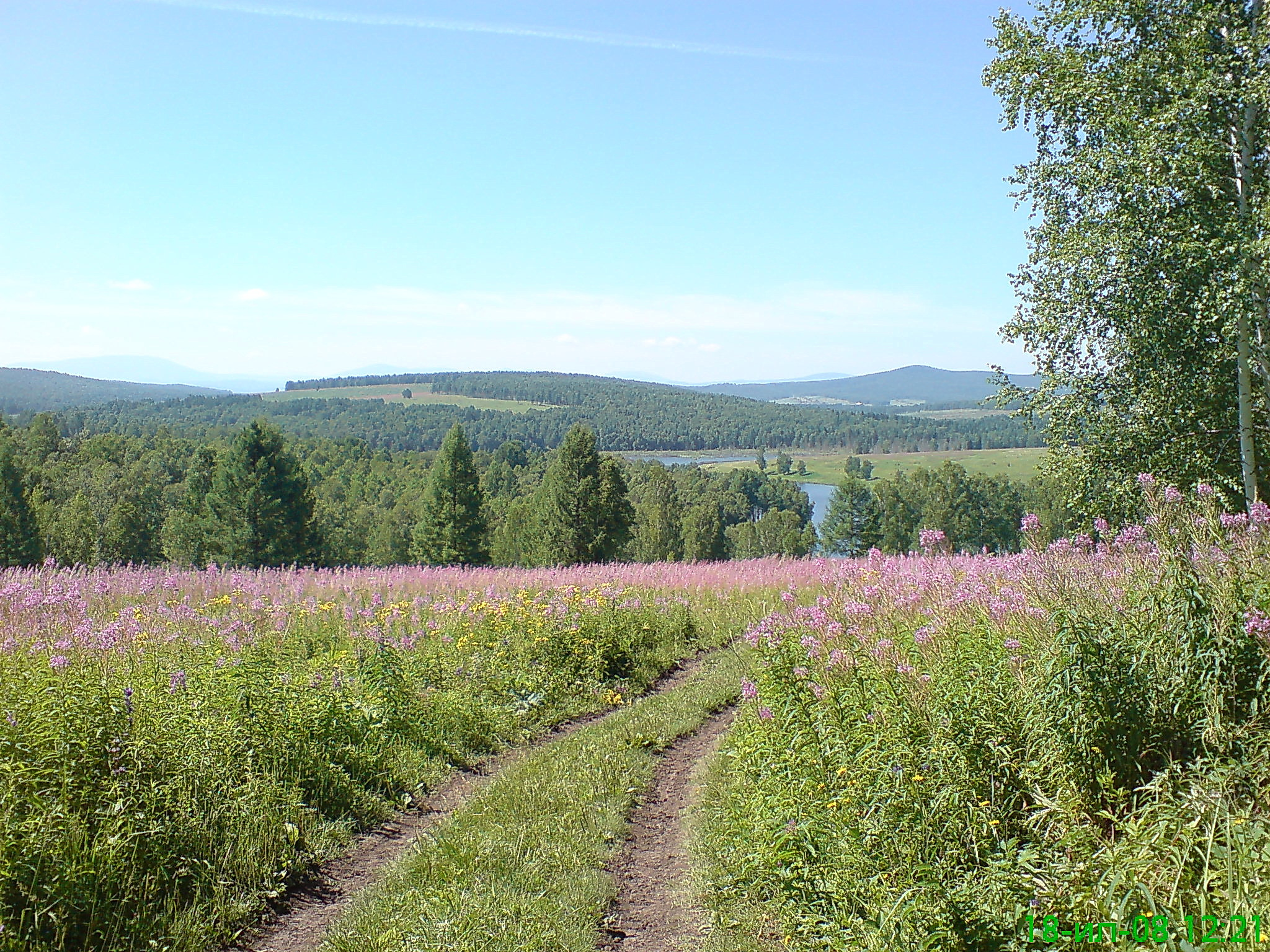 Вид на михайловское озеро